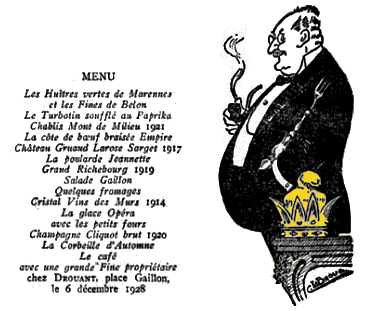 Curnonsky et le menu du déjeuner de galla de l'A. des Gastronomes Régionaliste de décembre 1928 chez Drouant par Camille La Broue